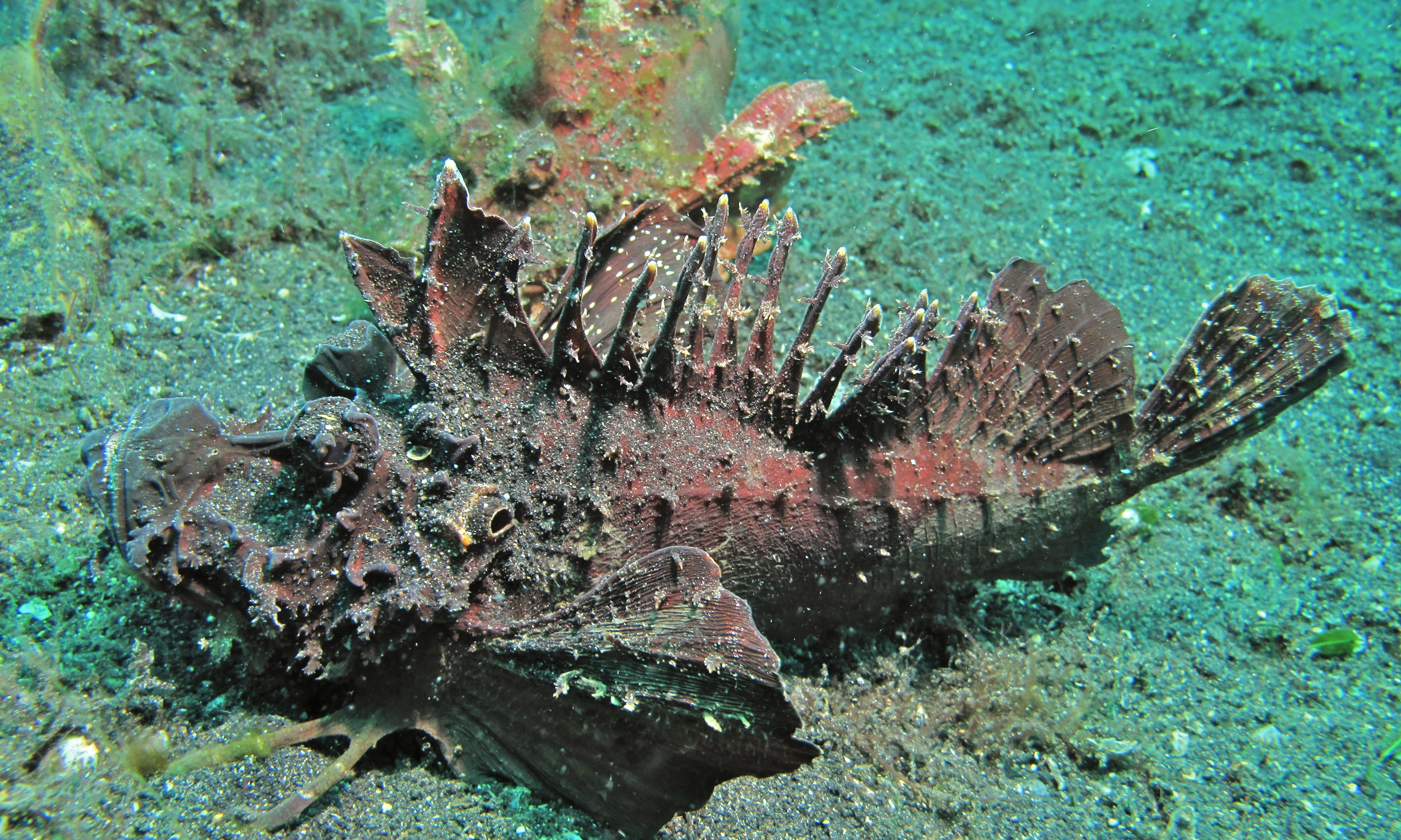 Hairball I, Lembeh Strait, Sulawesi, INDONESIA